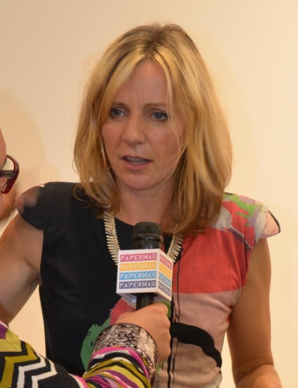 Daryl Kerrigan (Daryl K)